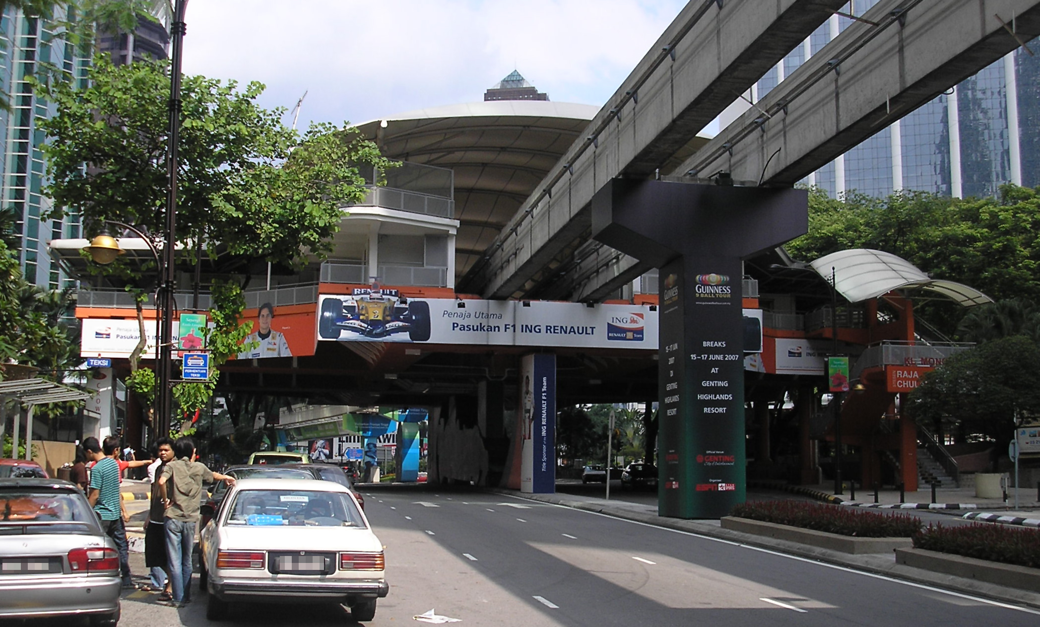 The Raja Chulan station (Kuala Lumpur Monorail) (exterior), Kuala Lumpur, Malaysia.